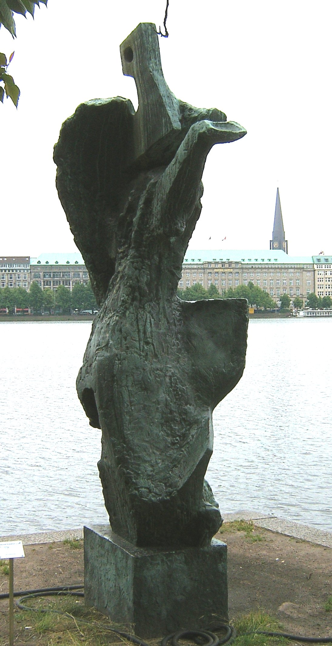 Bildbeschreibung: Hamburg, Binnenalster: H.M. Ruwoldt,"Die Windsbraut"(Bride of the wind), 1986 Bronze Fotograf: selbst Datum: 28.6.2006